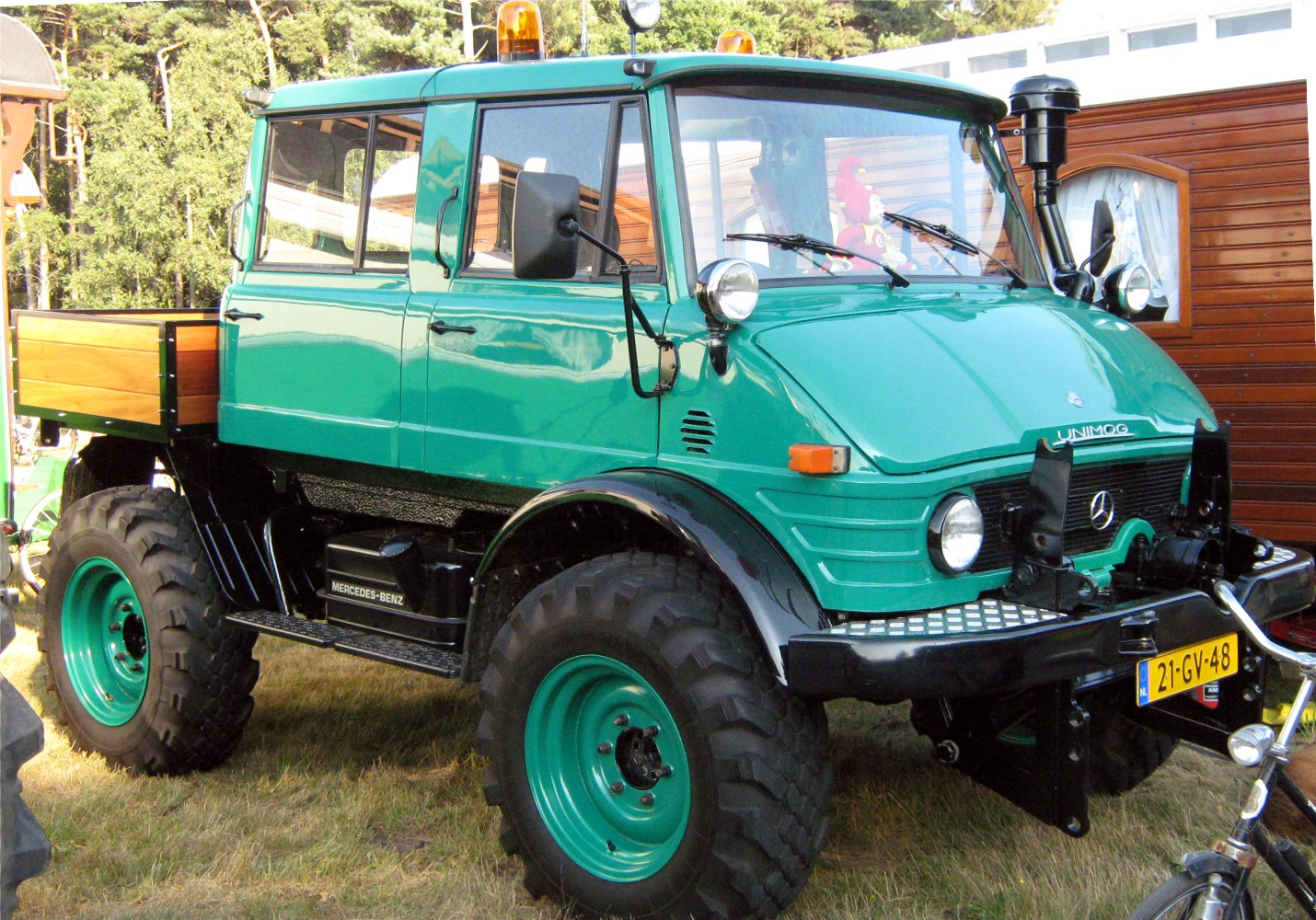 Vliegfeld Weelde, 21ste Oldtimer Festival des Historische Machineclubs Kempen, hellgrüner Unimog Doppelkabine